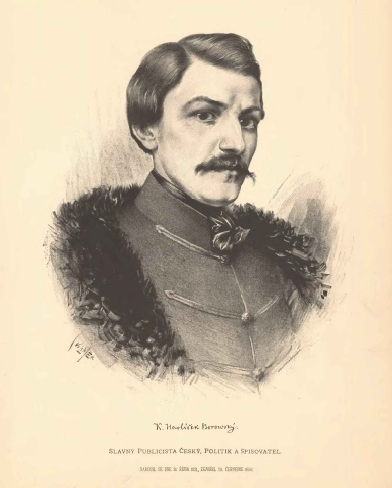 Portréty českých osobností od Jana Vilímka